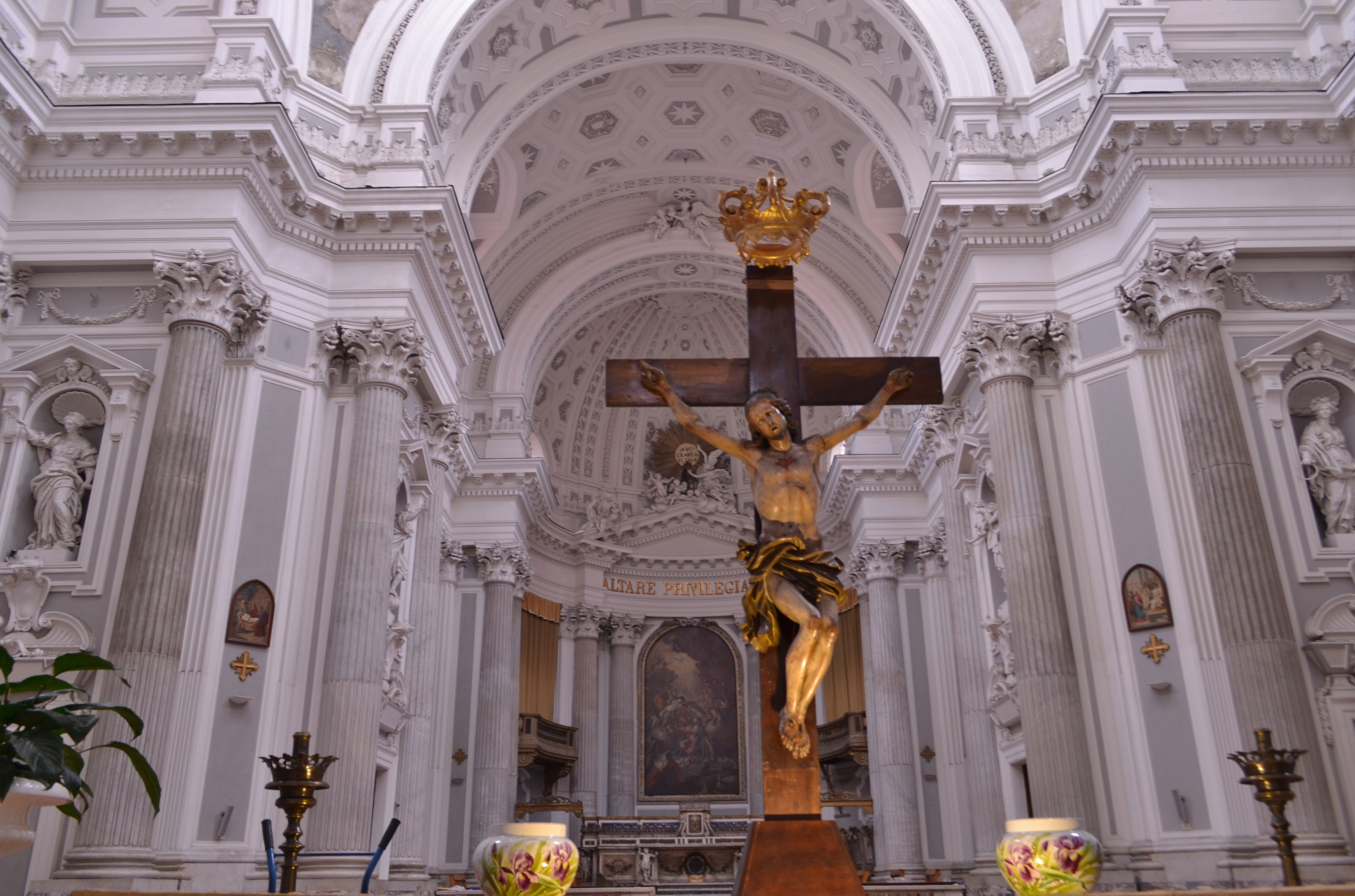 Transetto e altare maggiore